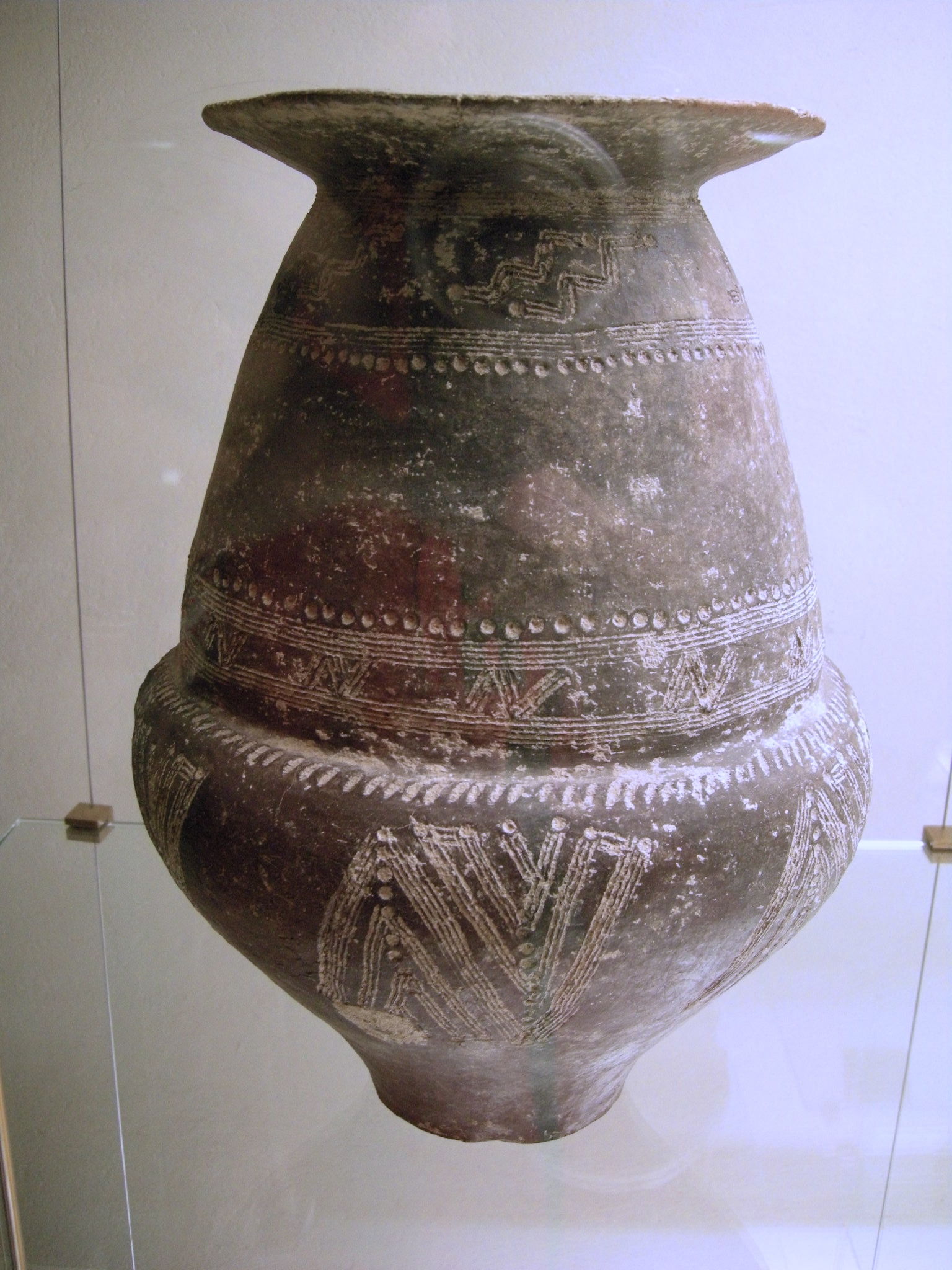 Urna cineraria biconica da tarquinia, con decorazione impressa e incisa IX.VII sec. ac.